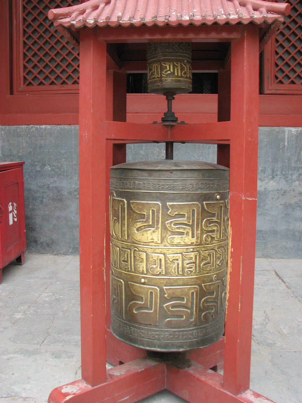 Yonghe Lama Temple 转钟